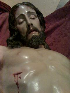 Primer plano del titular de la hermandad del Santo Entierro de Manzanares